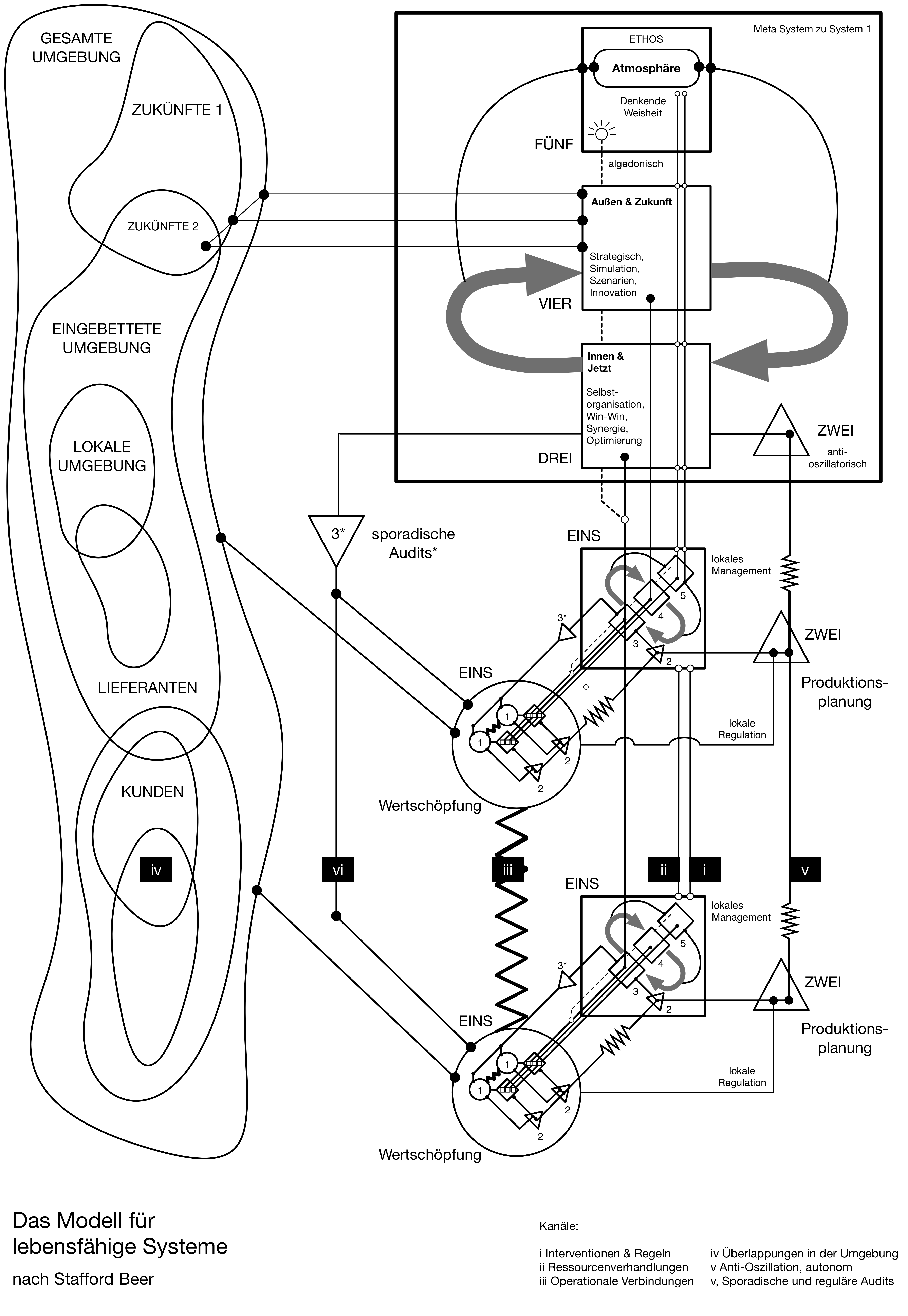 Grafische Darstellung des Viable System Modells von Stafford Beer, angereichert mit den Namen und Funktionen der Management-Kanäle